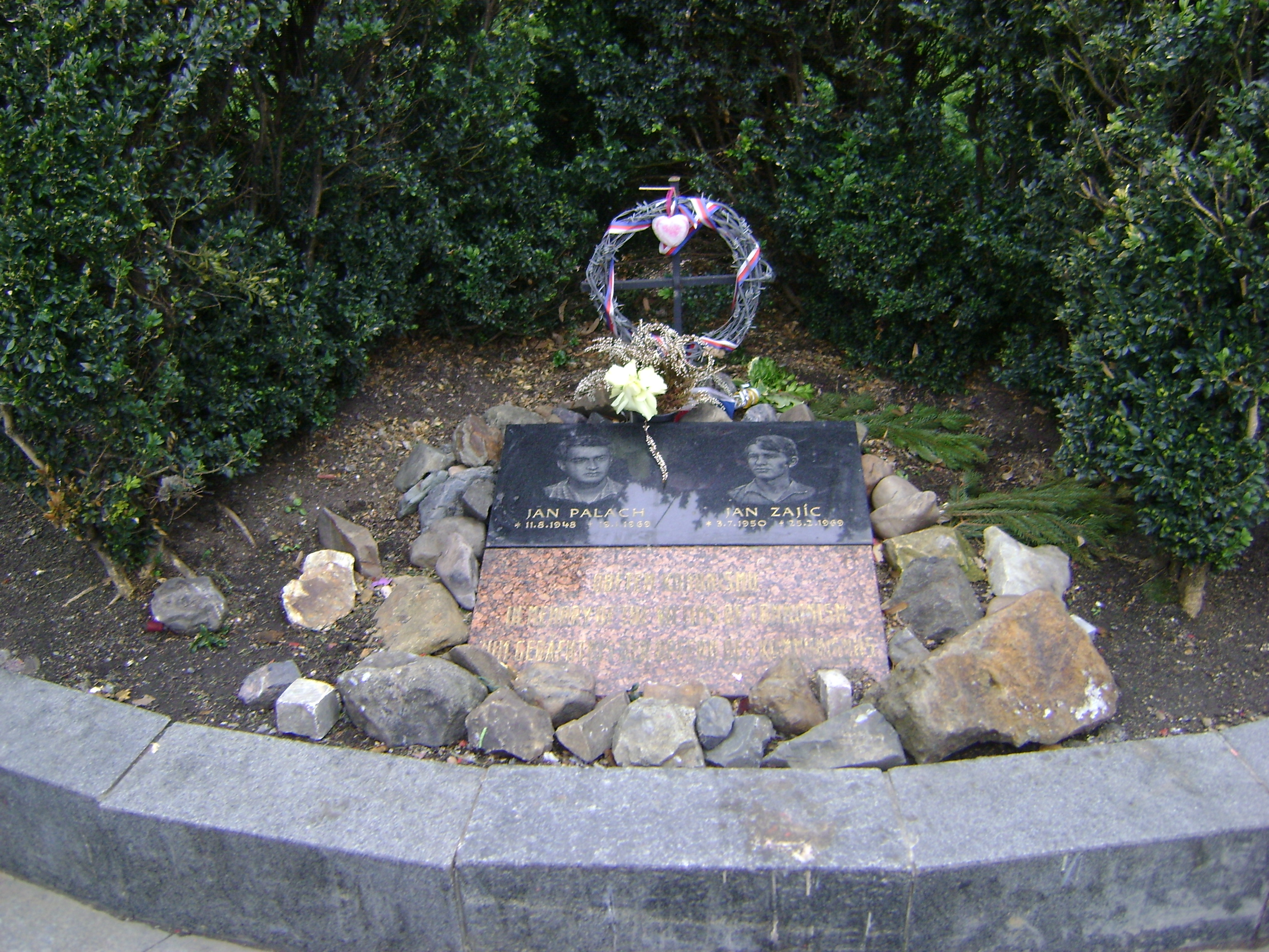 Вацлавська площа (Прага).